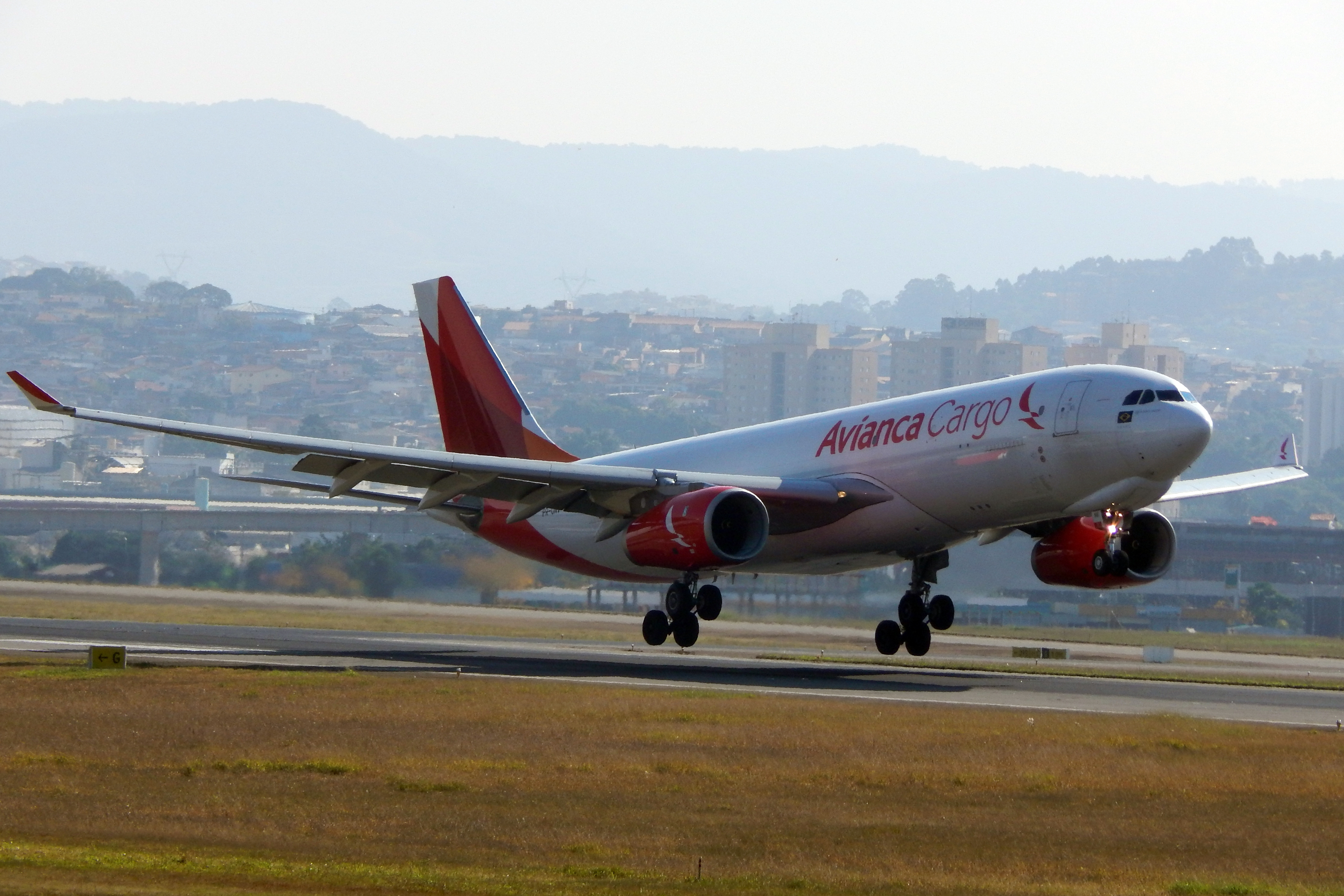 Avianca Brasil PR-ONV Airbus A330F landing on GRU Airport